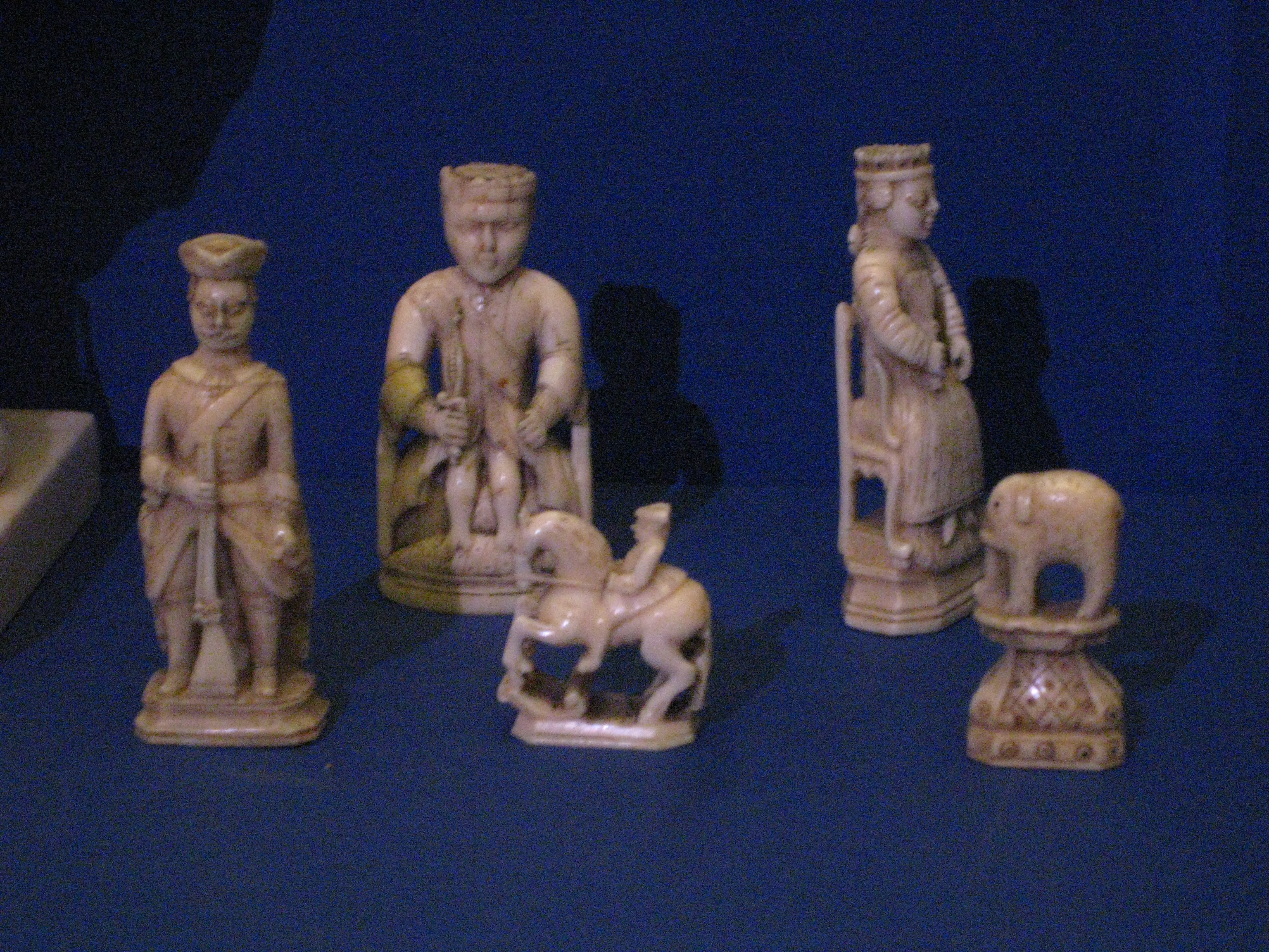 Шахматные фигуры. Россия, сер. 18 века. Моржовый клык. ГИМ.